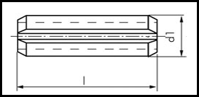 DIN 1481